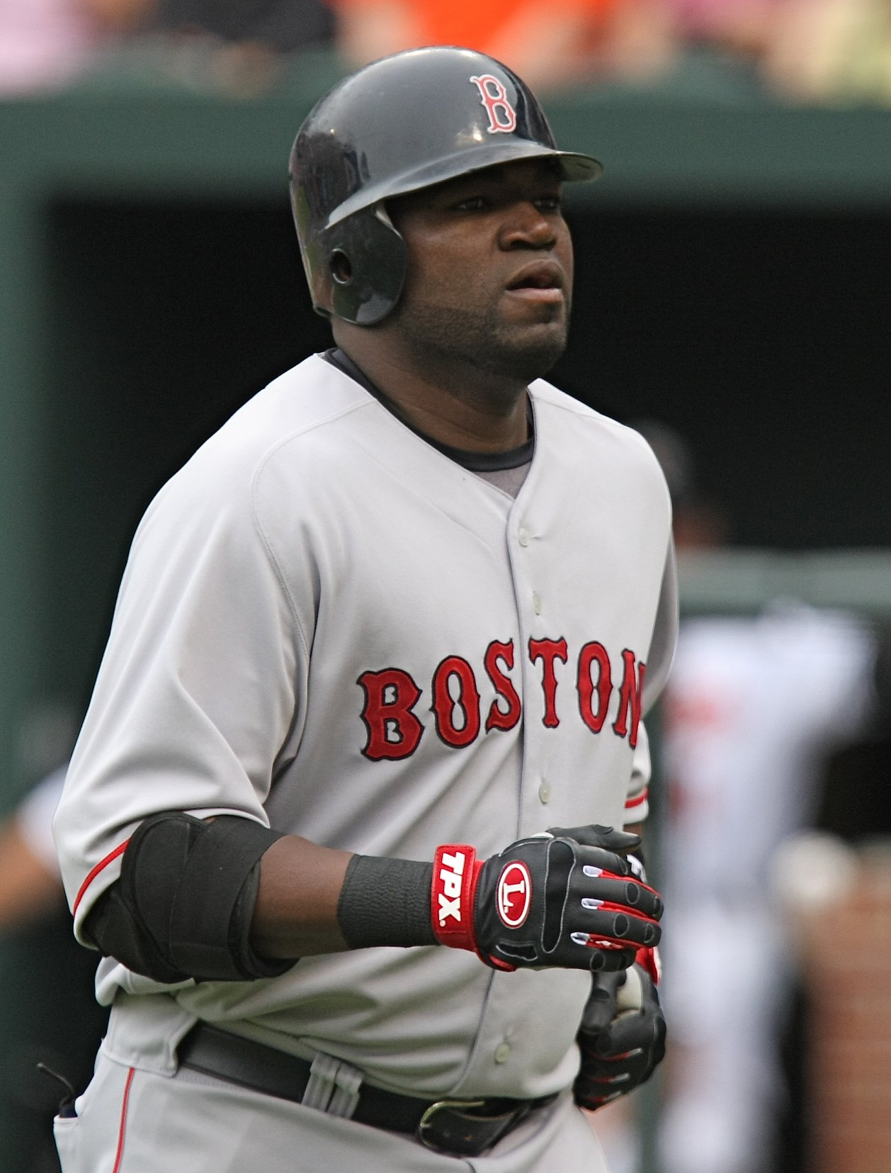 David Ortiz en 2008.